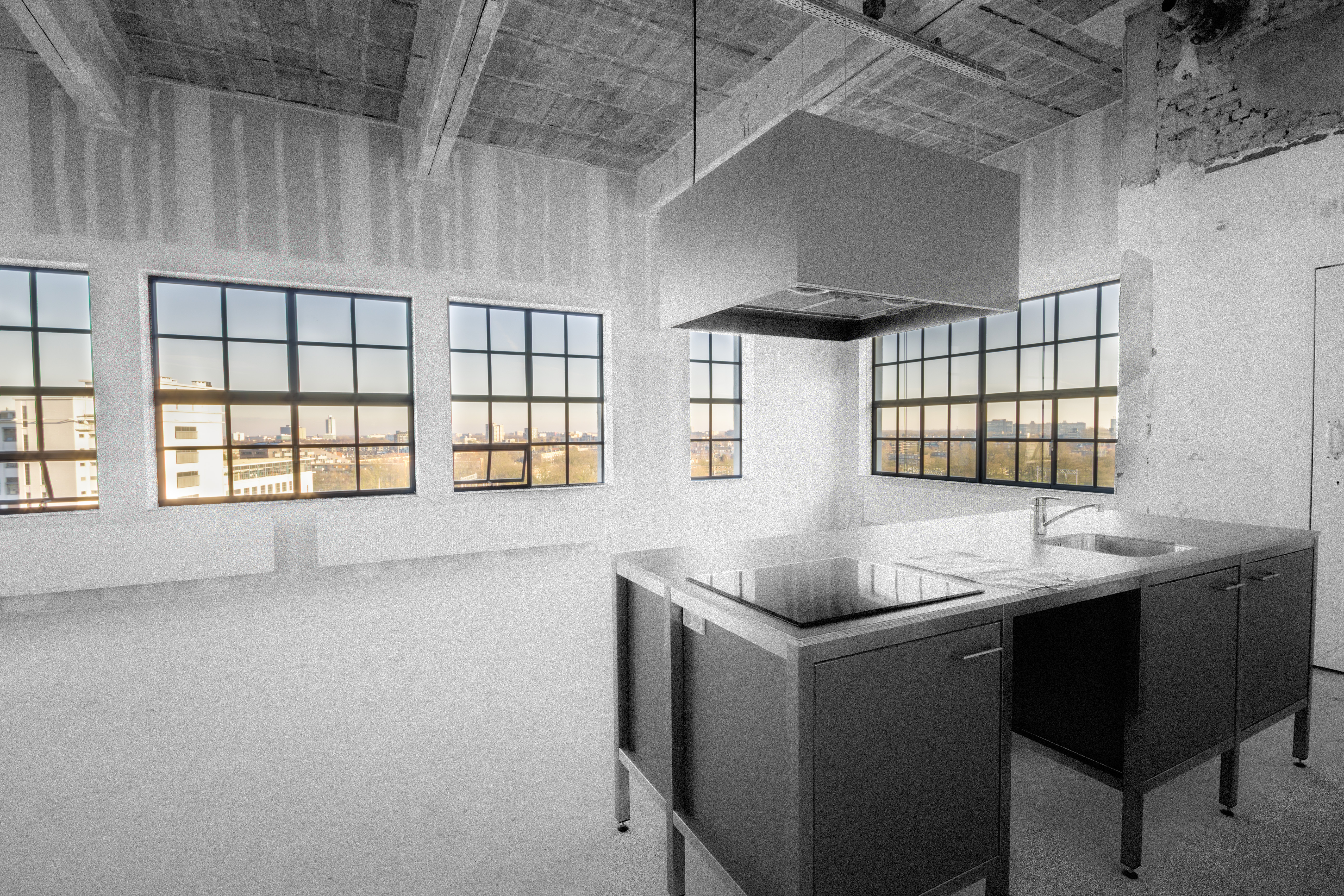 Een kale loft in gebouw Gerard, geschoten voor de oplevering.